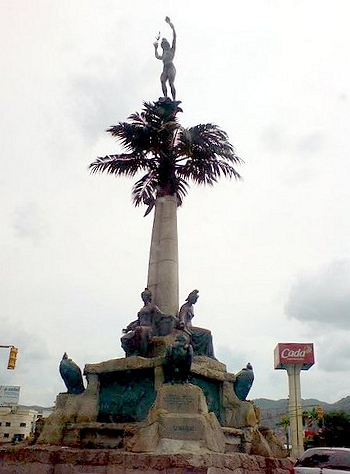 La India Monument, Caracas, Venezuela.